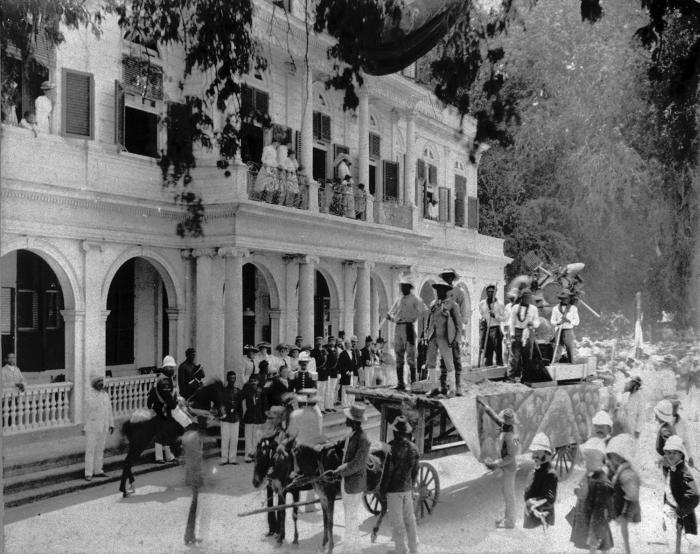 Foto. Tableau vivant voorstellende "de Gouddelving" tijdens de optocht voor het Gouvernementspaleis in Paramaribo op 31 augustus 1892.